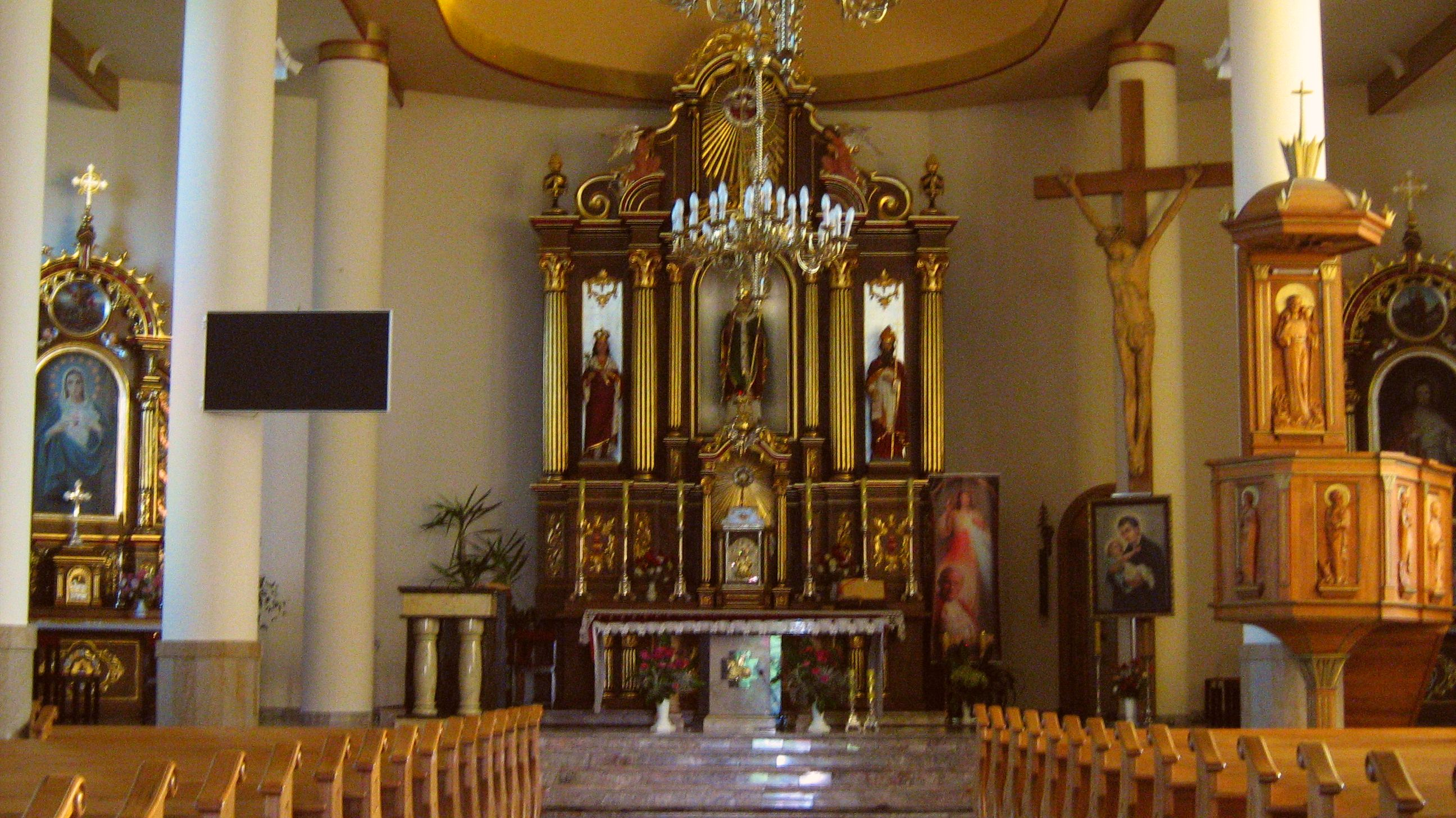 Wnętrze kościoła parafialnego w Racławicach k. Niska, woj. podkarpackie.